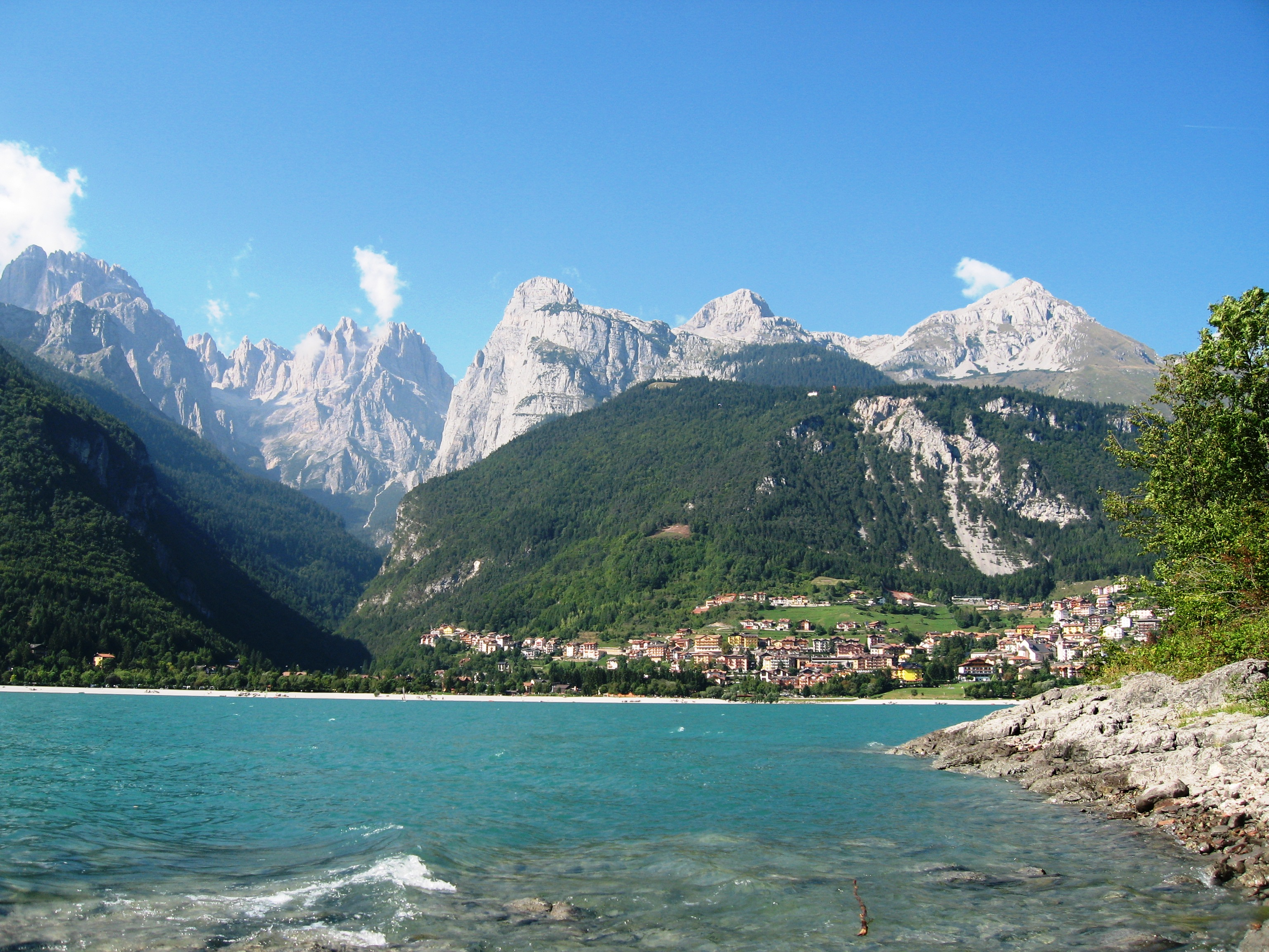 uno scorcio del paesino di Molveno sulle rive dell'omonimo lago e ai piedi delle Dolomiti di Brenta